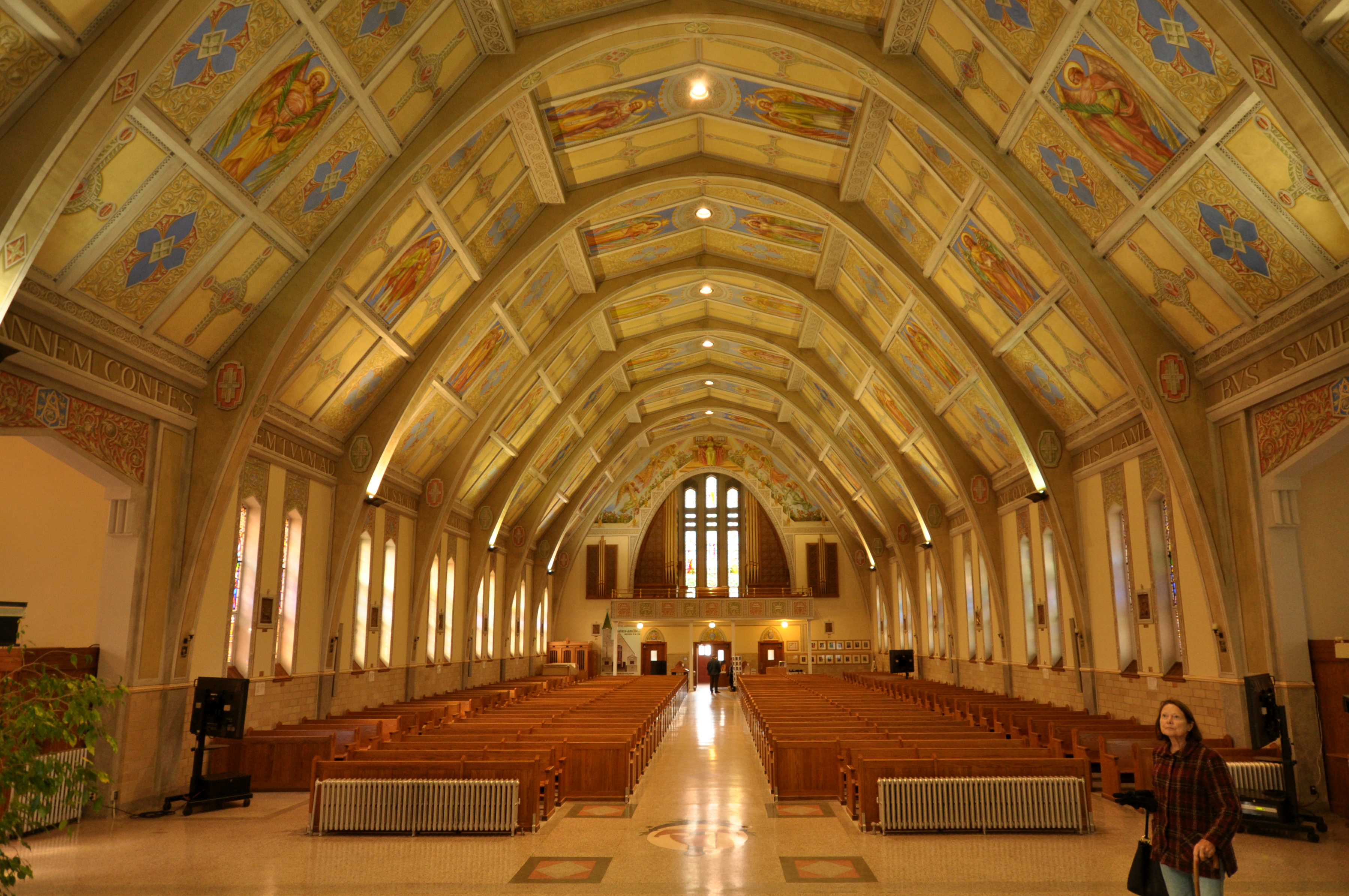 Église Sainte-Amélie, avenue Marquette, Baie-Comeau (Canada). (Protection MH cité. Voir la liste des lieux patrimoniaux de la Côte-Nord pour plus de détails).